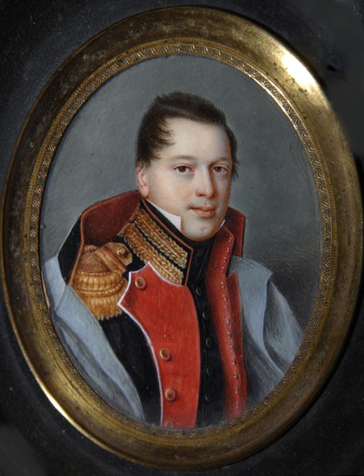 Михаил Михайлович Нарышкин. Неизвестный художник. Начало 1820-х.